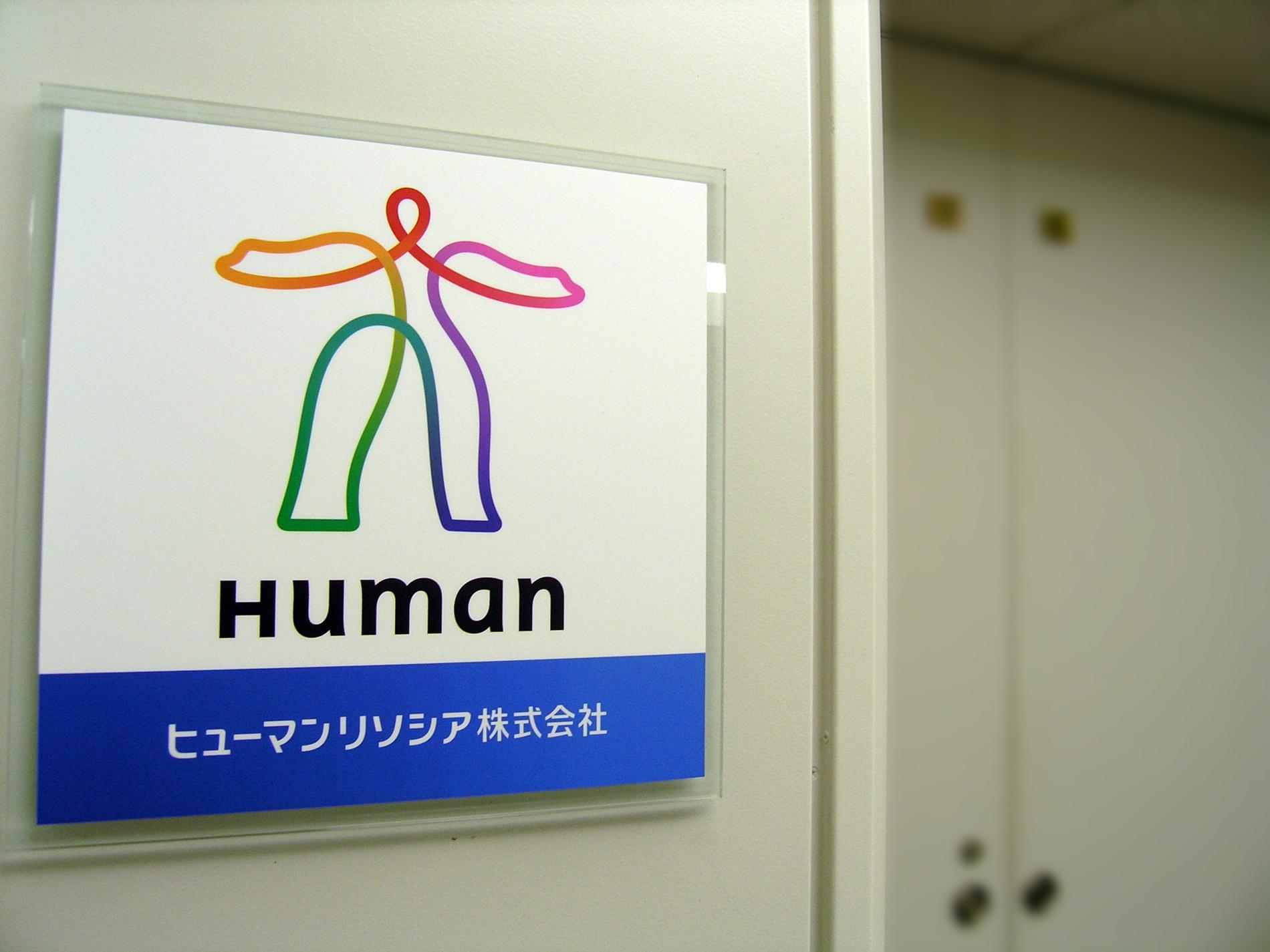 ヒューマンリソシア本社